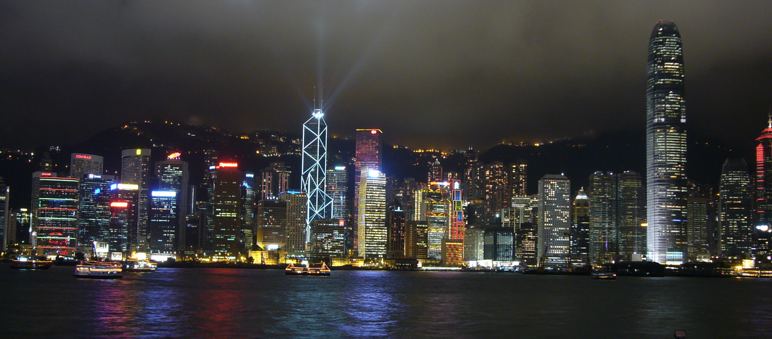 Hong Kong skyline at night